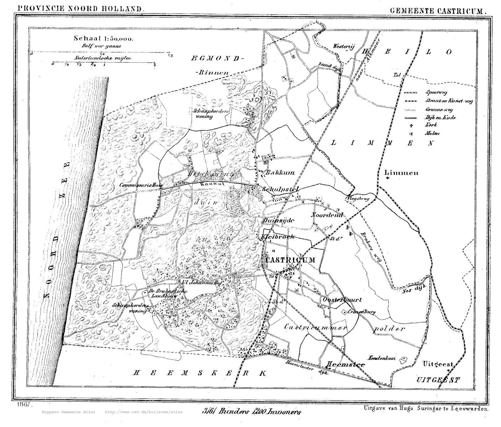 Kaart van Castricum uit Gemeente Atlas van Nederland, J. Kuyper 1865-1870, Uitgave Hugo Suringar Leeuwarden.